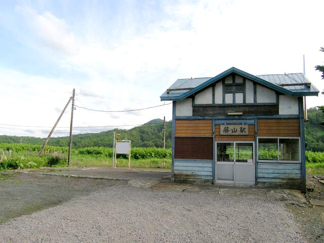 駅舎。左半分の事務室部分が取り壊されてしまっている。 撮影場所 藤山駅駅前広場 撮影者によるGFDLリリース